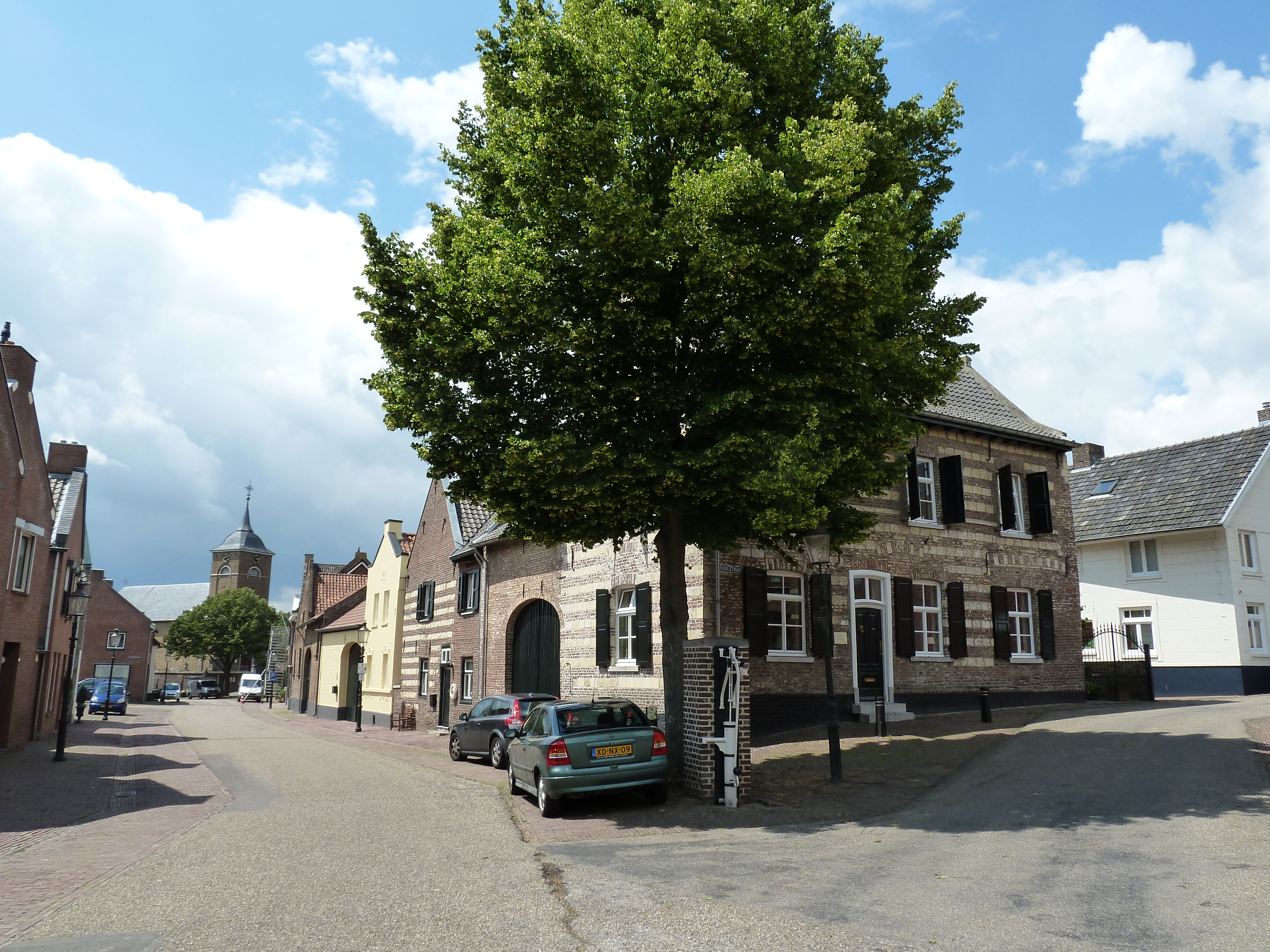 Straatgezicht vanaf de Hoolstraat (rechts) de Grotestraat in, Urmond, Limburg, Nederland